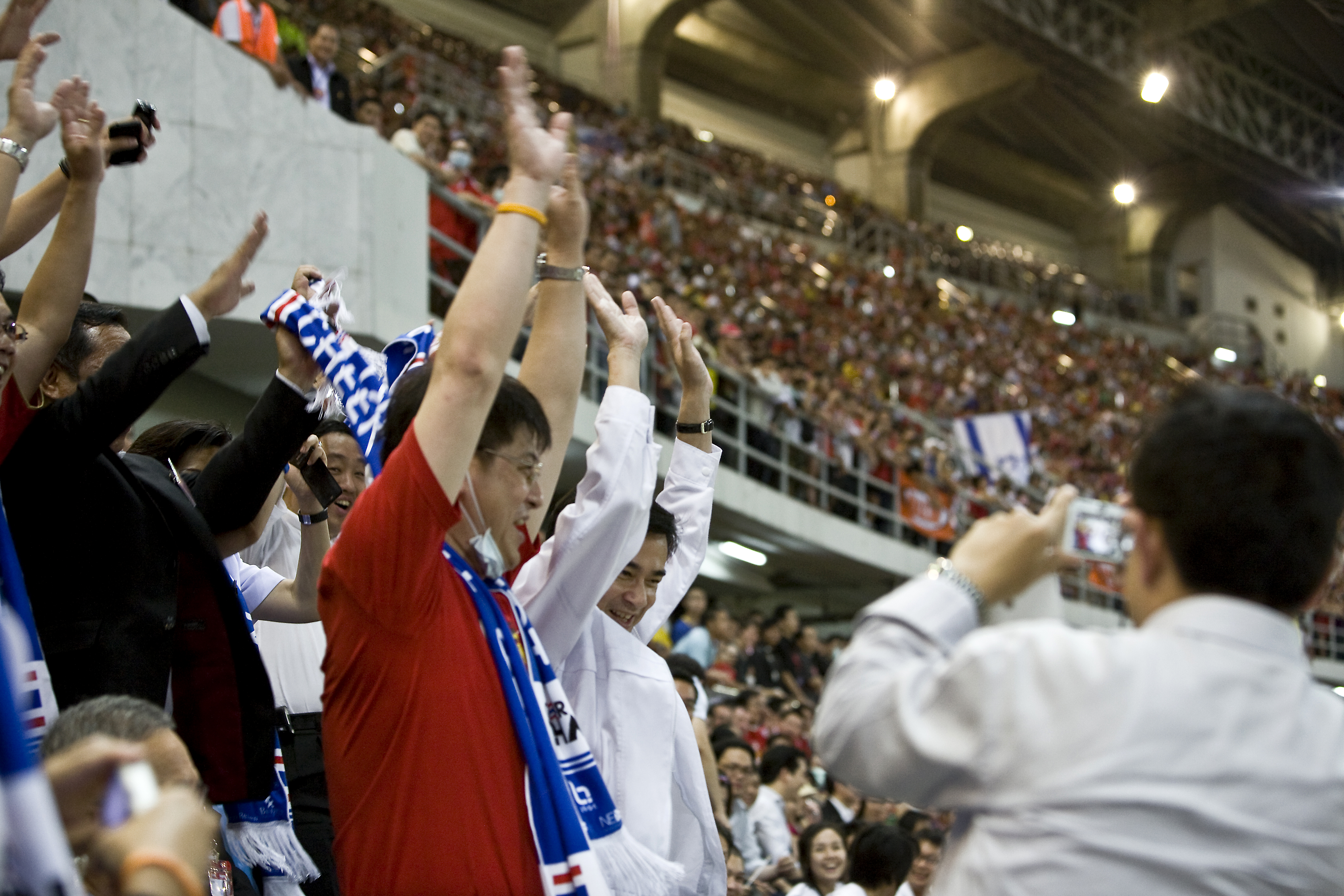 นายกรัฐมนตรี เป็นประธานทีมเชียร์ไทย ในการแข่งขันฟุตบอลทีมชาติไทย-ทีมลิเวอร์พูล ณ สนามราชมังคลากีฬาสถาน 22 กรกฏาคม 2552 (The Official Site of The Prime Minister of Thailand Photo by พีรพัฒน์ วิมลรังครัตน์)